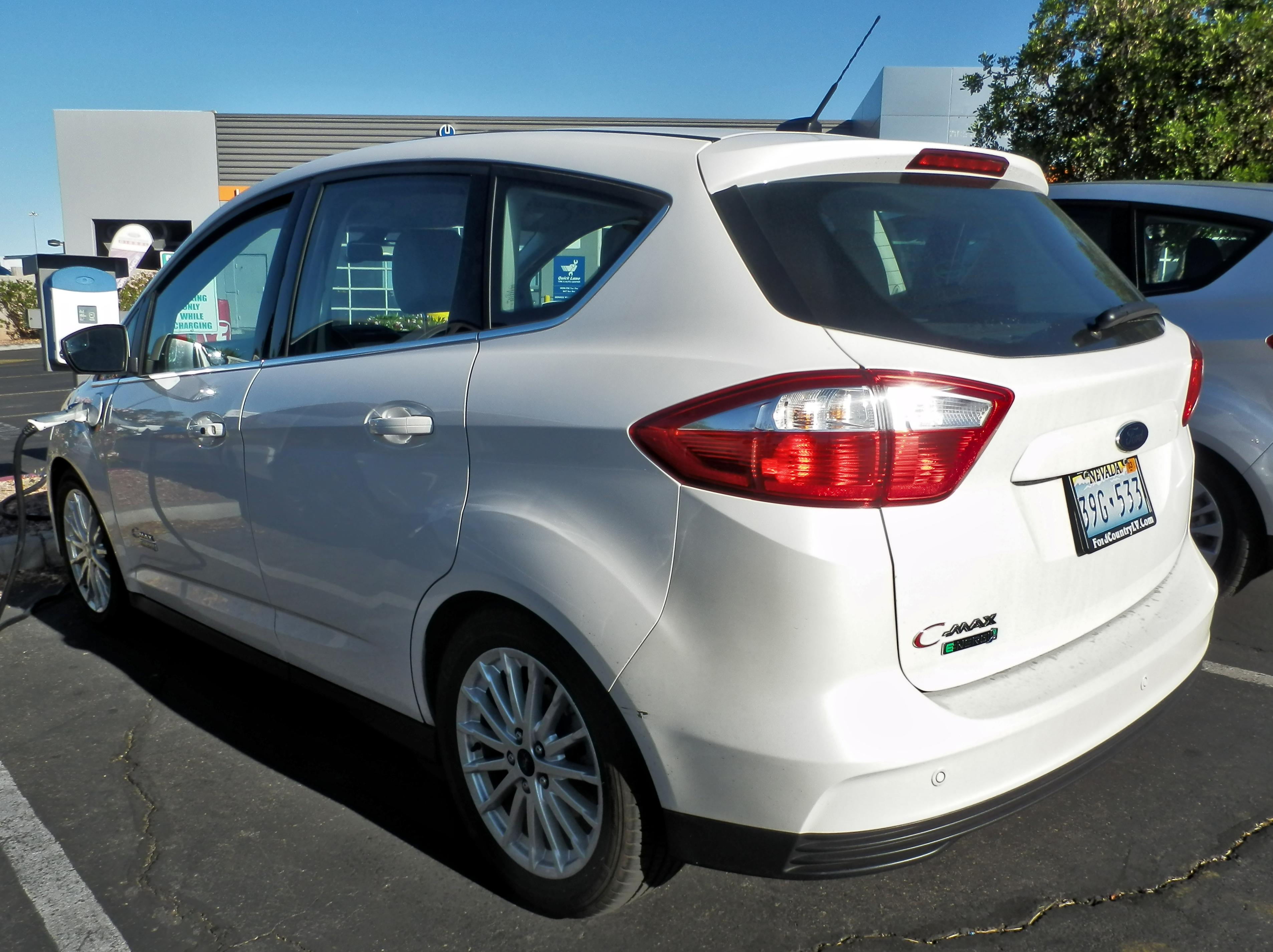 Ford C-Max Energi in Las Vegas